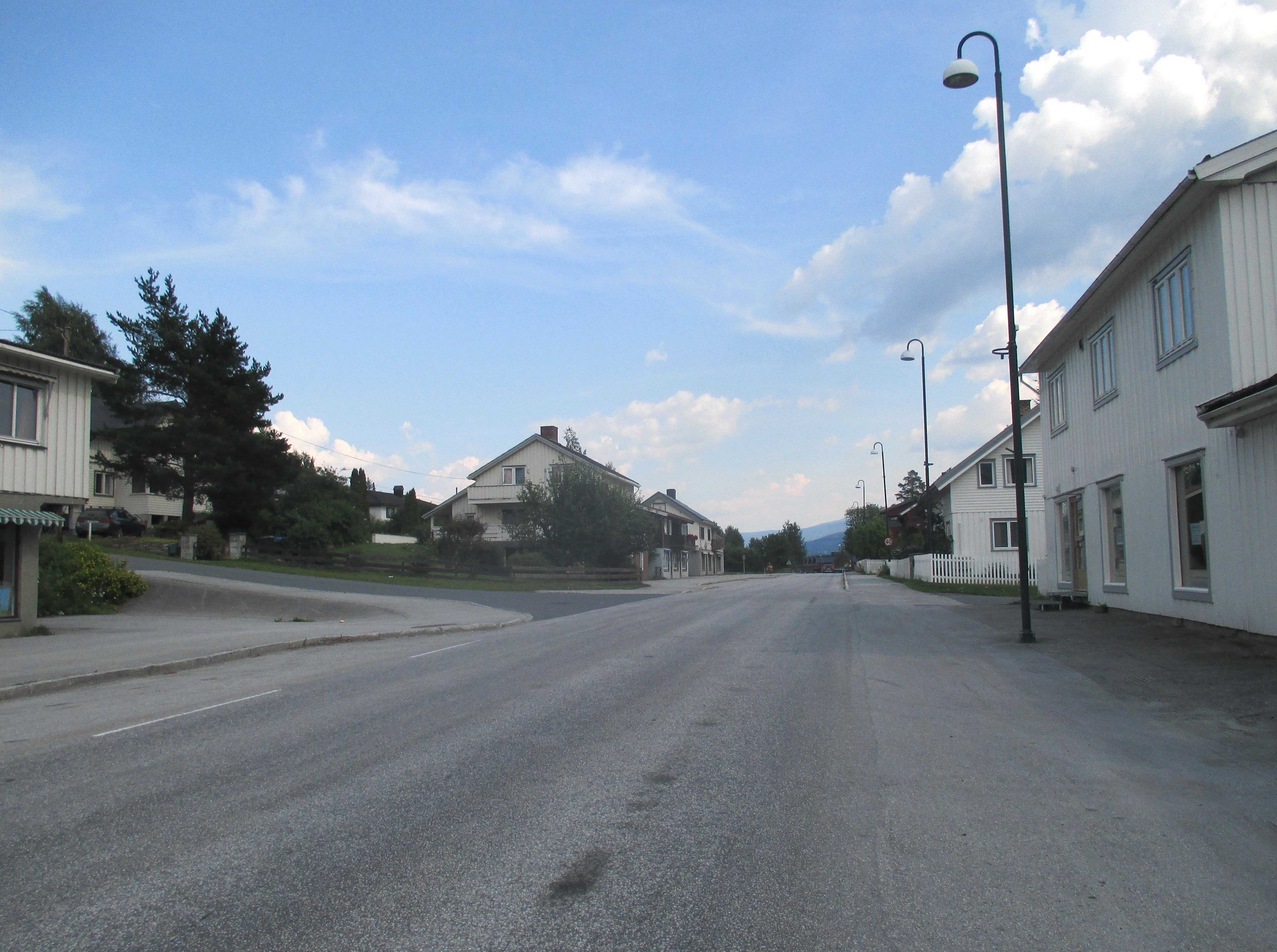 Nedregata på Vinstra er fylkesvei 410.